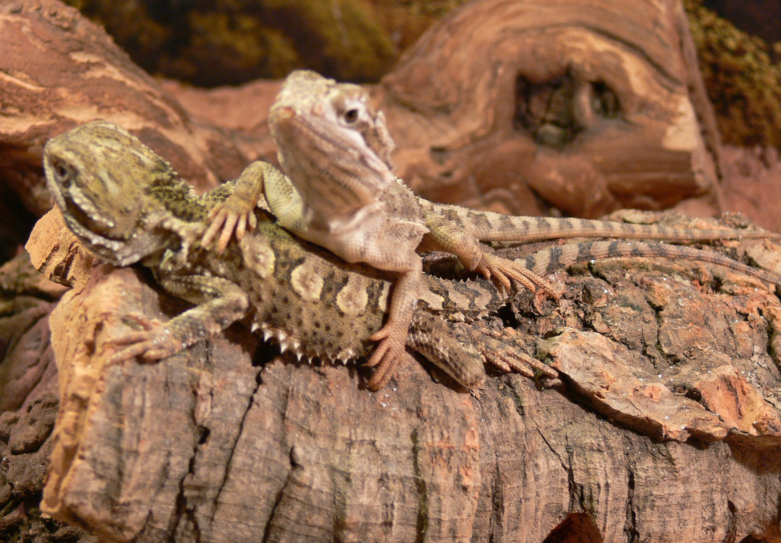 pogona henrylawsoni